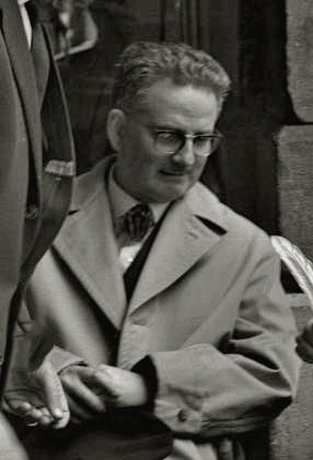 Título original: Juan Repiso, Julio Caro Baroja y Joaquín Muñoz Baroja en la plaza de Gipuzkoa (1/3) Localización: San Sebastián (Guipúzcoa)